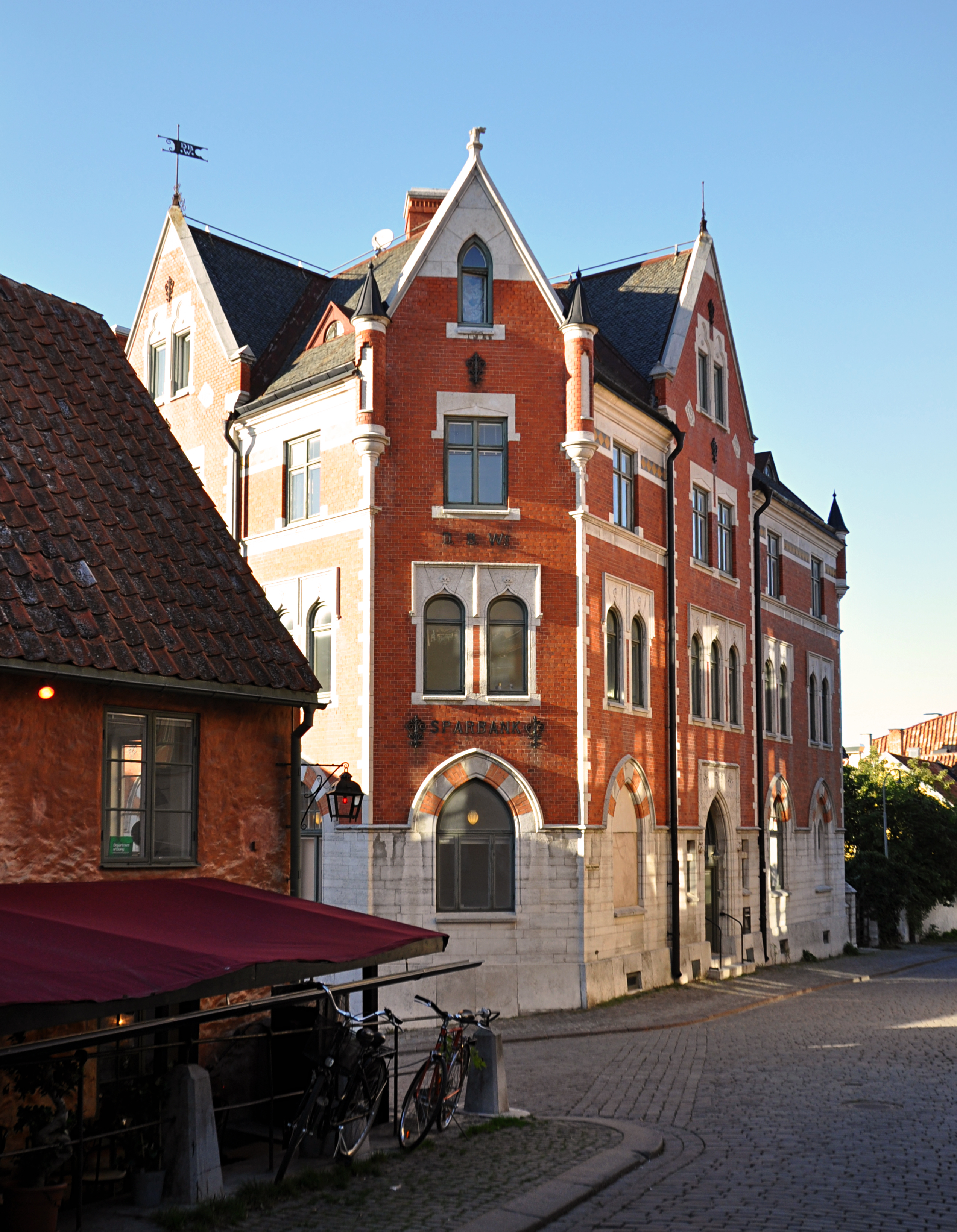 DBW:s Sparbank i Visby. Adress: Södra Kyrkogatan 3, Schweitzergränd 5. BBR Anläggnings-ID: 21300000013971